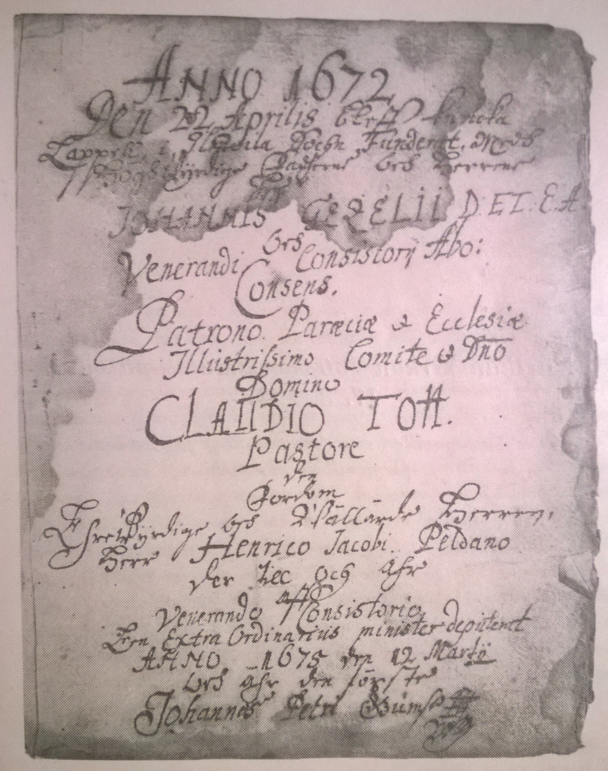 Kurikan kappelin perustamisasiakirja vuodelta 1672. Siinä Kerrotaan, että Kurikka niminen kappeli perustettiin 22 huhtikuuta 1672.